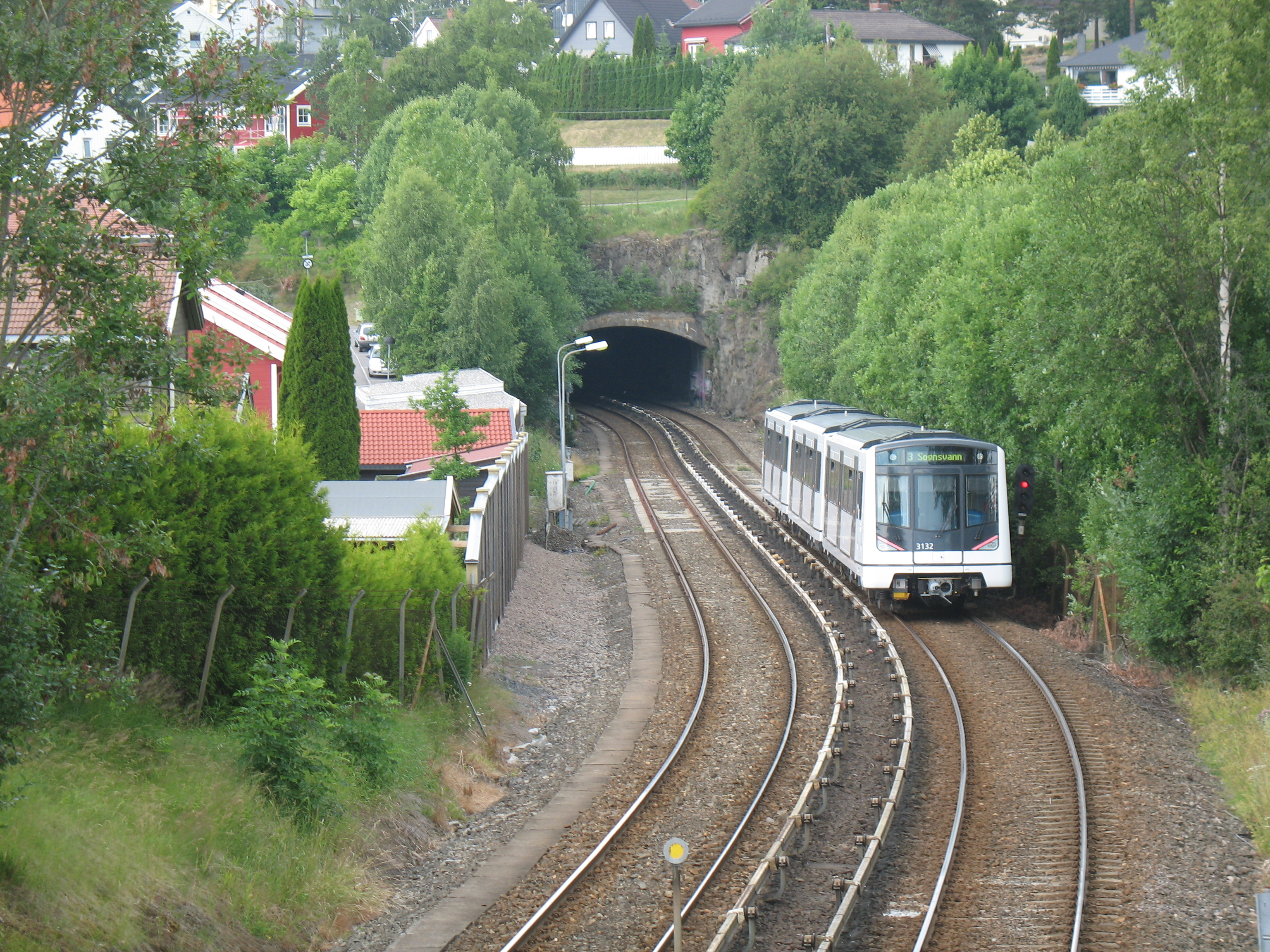 MX3000-tog på vei inn i tunnelen mellom Ulsrud stasjon og Oppsal stasjon